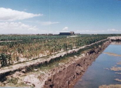 Waru waru moderno construido en las inmediaciones de Ilave. Programa de Recuperación de tierras financiado por la Unión Europea. 1988 - 1991 Autor: Alfredo Bianco